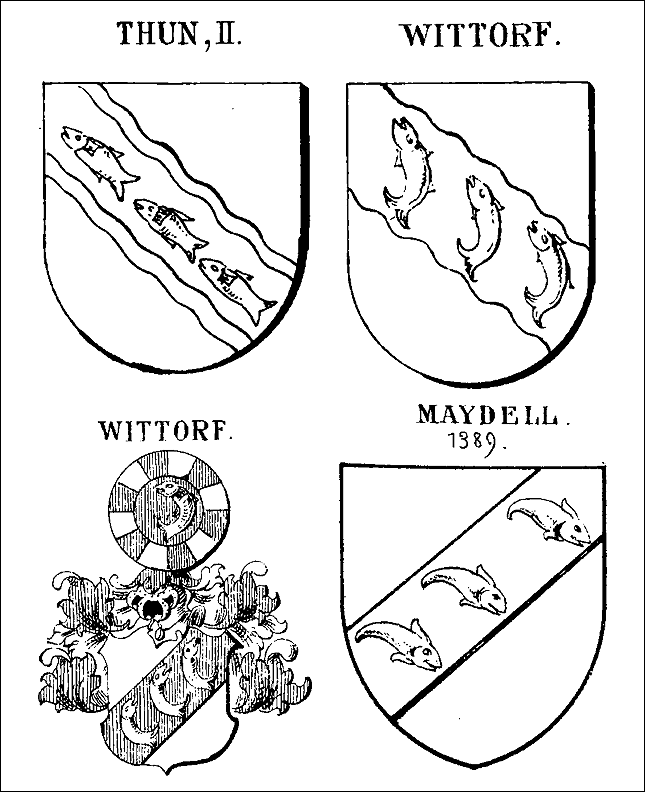 Neuer Siebmacher: Ausgestorbener Meklenburgischer Adel für Wittorf 1328 u. Thun 1324, sowie Adel der Russ. Ostseeprovinzen für Maydell 1389